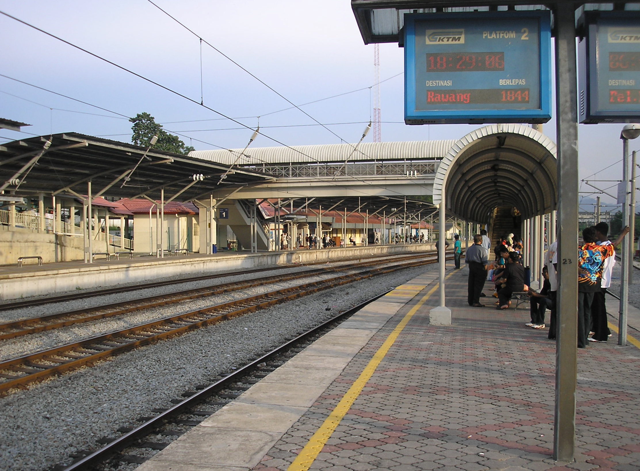 The Rawang railway station, Rawang, Selangor, Malaysia.